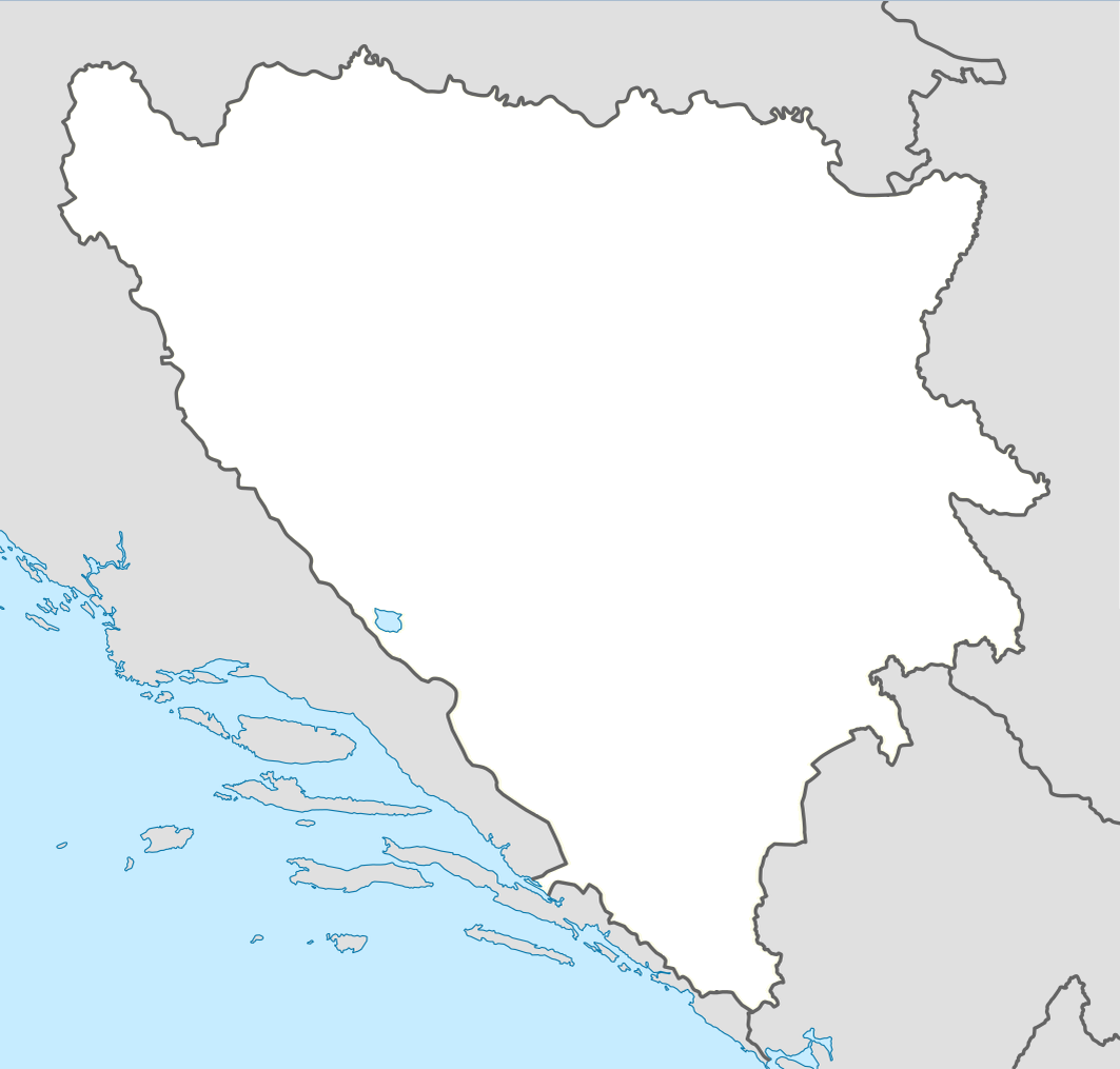 Karta Bosne i Hercegovine